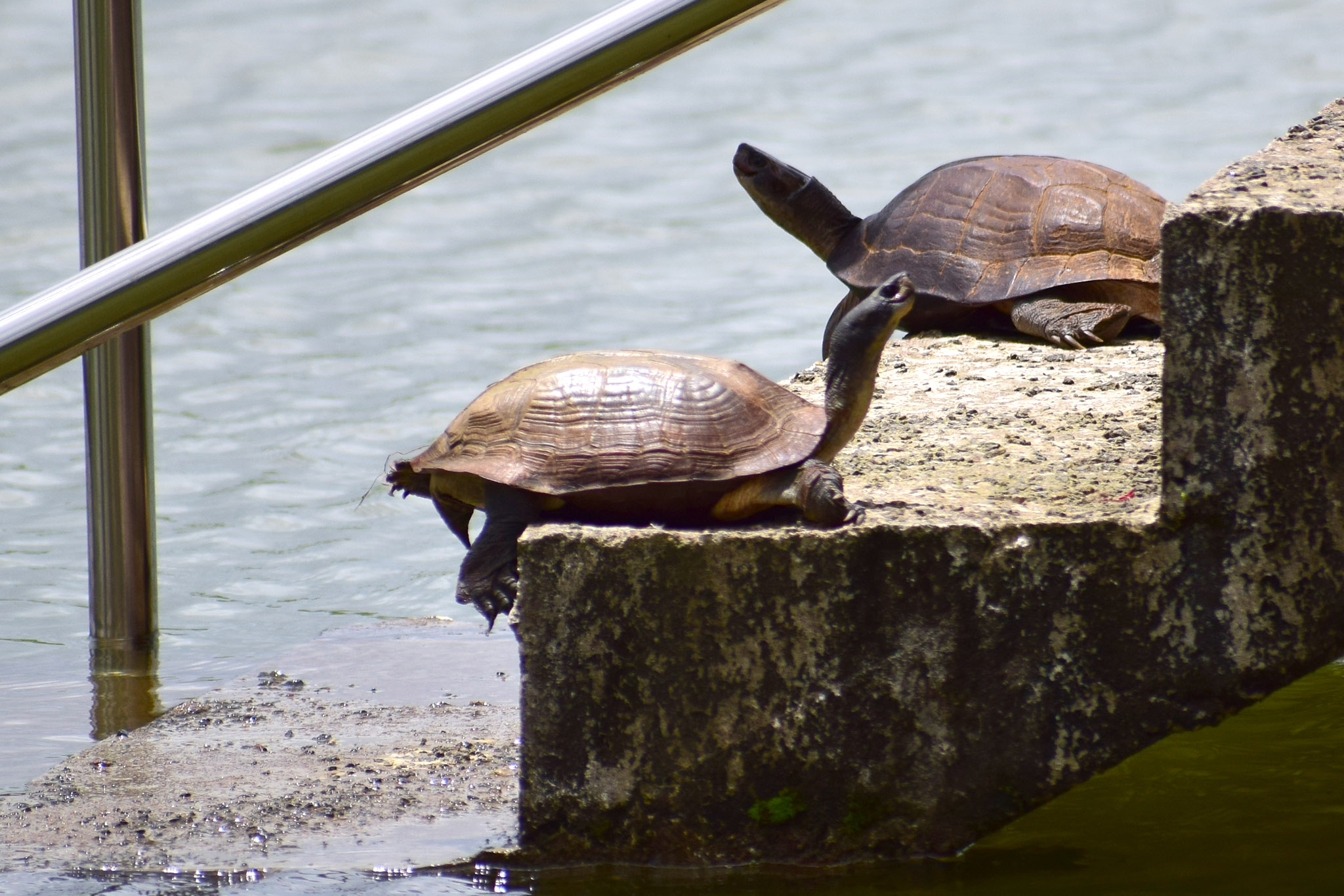 ആമകൾ വിശ്രമിക്കുന്നു